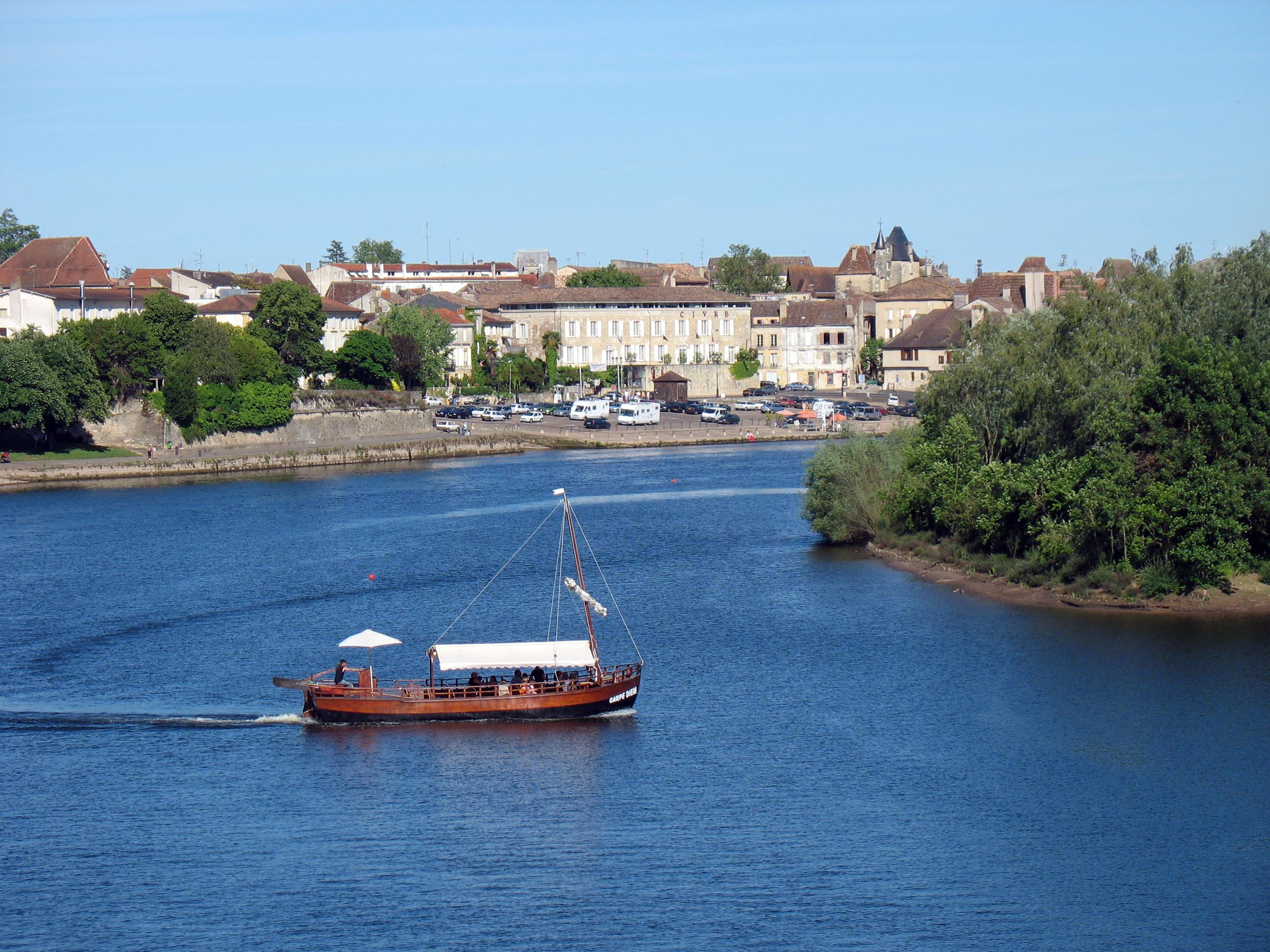 Gabare sur la rivière Dordogne à Bergerac. Auteur : Monster1000 France, mai 2006